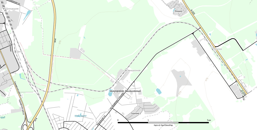 Map data: Openstreetmap contributors